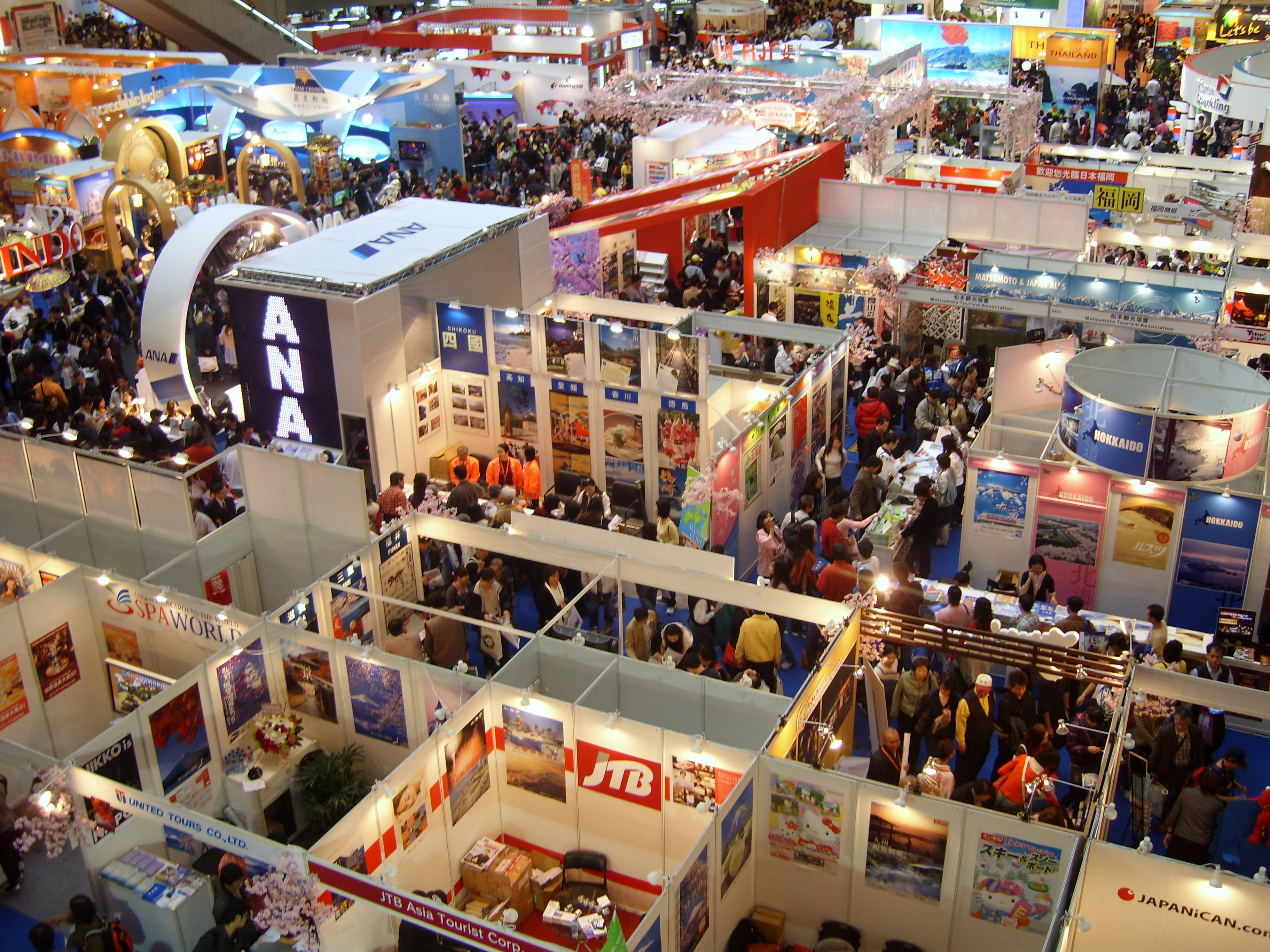 2007 Taipei International Travel Fair.